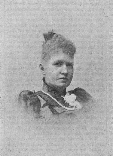 Swedish feminist Ellen Anckarsvärd (1833-1898)